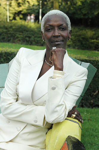 Portrait d'Esther KAMATARI